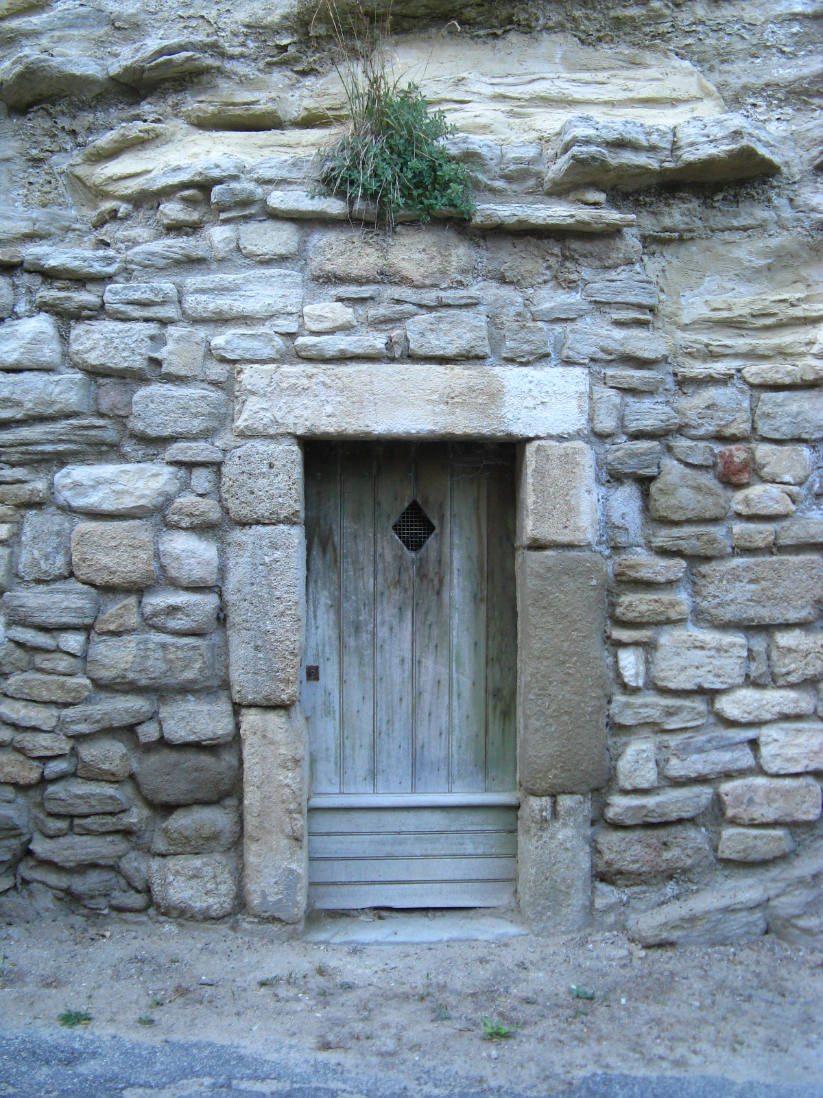 Habitat troglodytique sous le rocher de Saignon